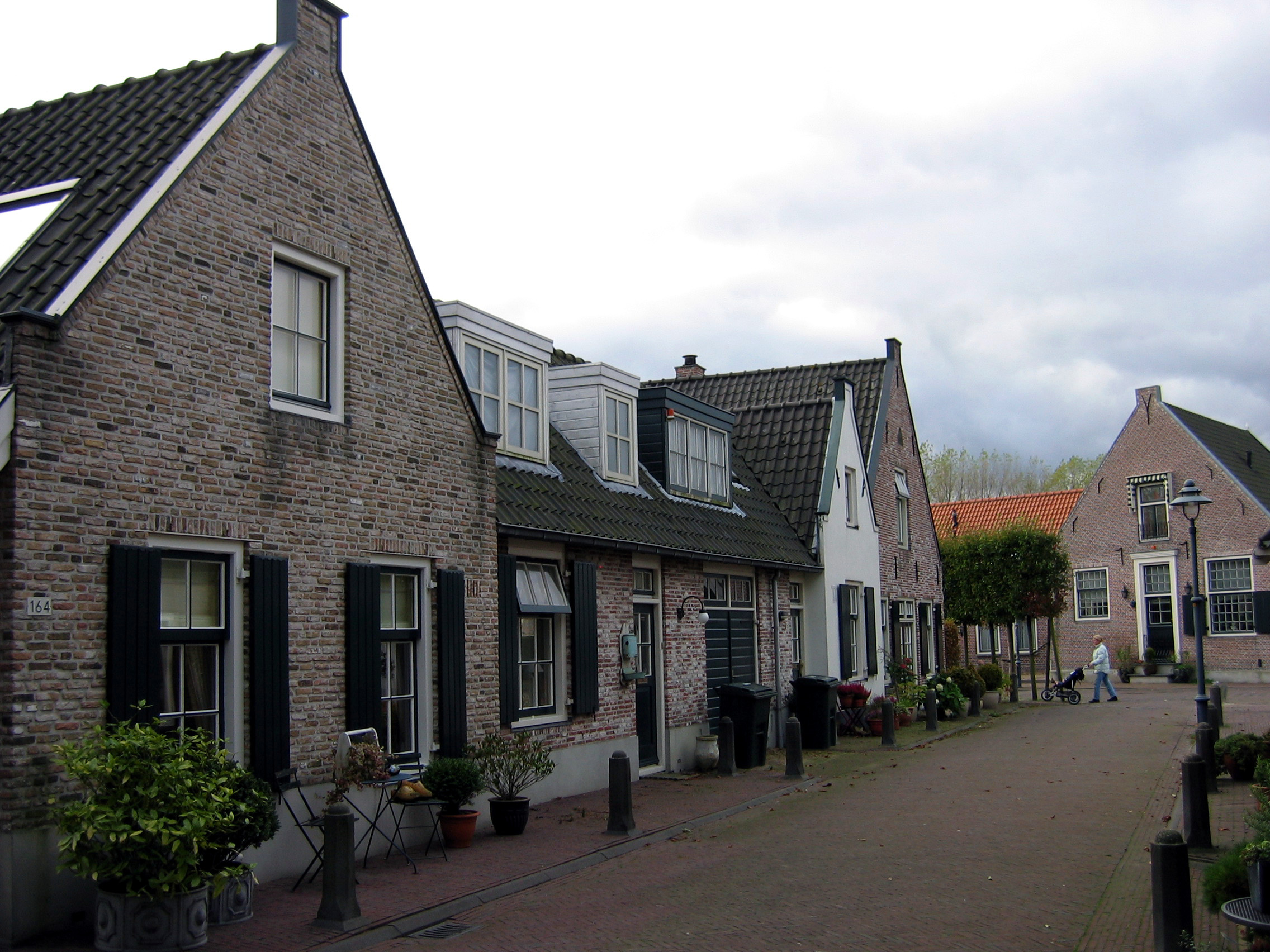 Oud Diemen